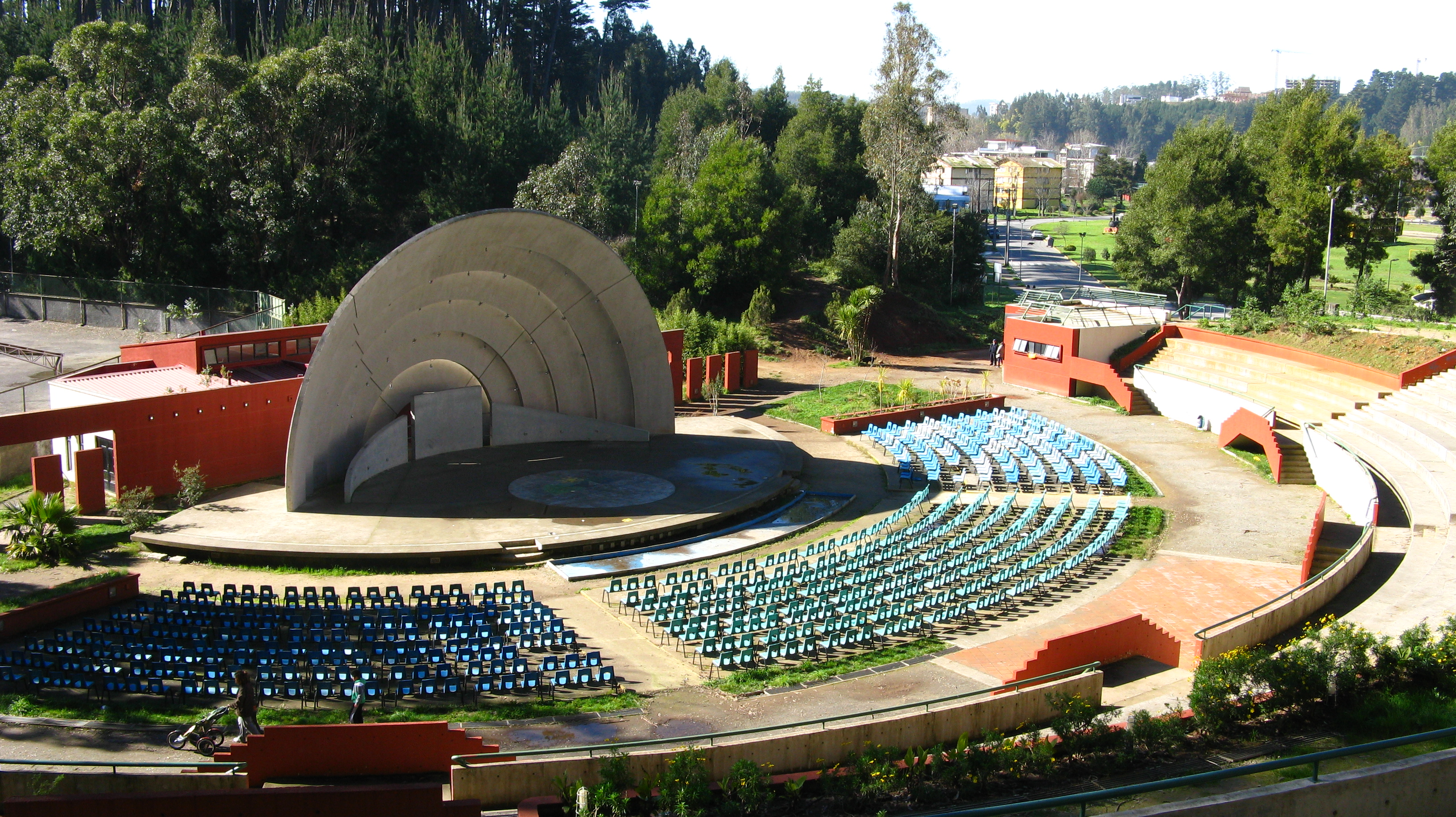 Anfiteatro San Pedro de la Paz San Pedro de la Paz, Provincia de Concepción Region del Biobío, Chile Julio de 2012